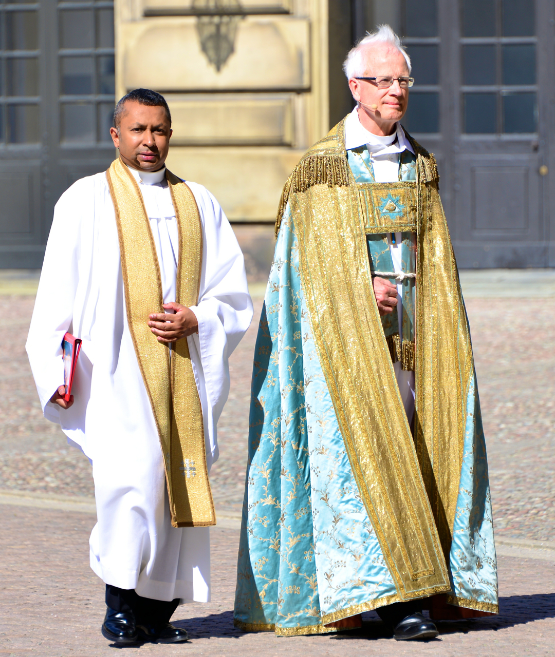 Michael Bjerkhagen och Lars-Göran Lönnermark på väg in till slottskyrkan på Kungliga slottet i Stockholm inför vigseln mellan prinsessan Madeleine och Christopher O’Neill den 8 juni 2013.